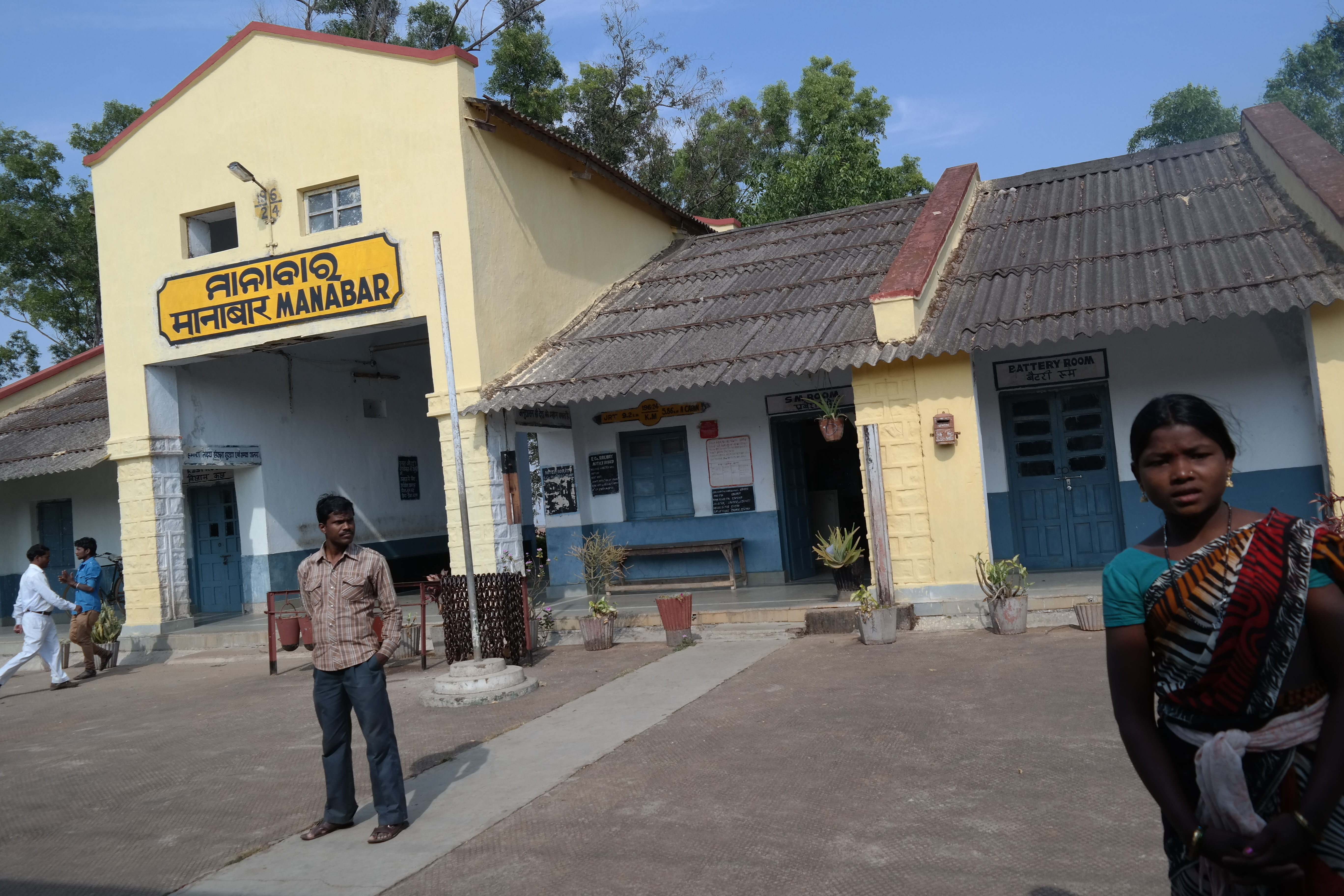 Manabar railway station in Araku valley.Rajasekhar1961 (talk) 13:05, 3 June 2016 (UTC)